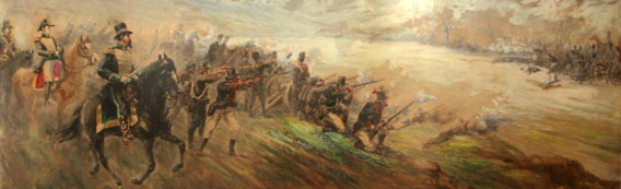 Retrato de la batalla de Tacuari